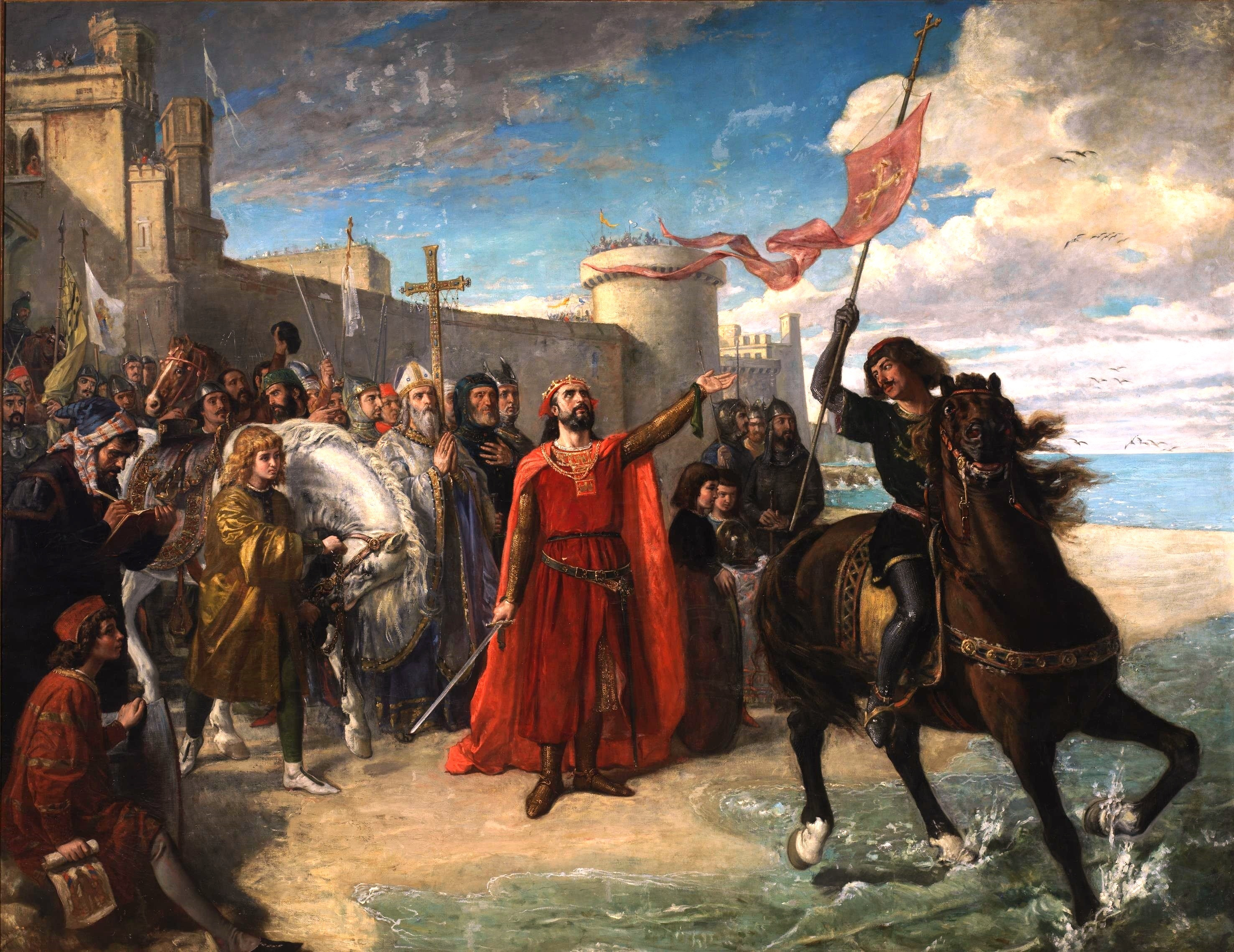 La obra muestra al rey Alfonso X de Castilla (1220-1284), apodado el Sabio, tomando posesión de las aguas del mar tras haber conquistado a los musulmanes la ciudad de Cádiz.